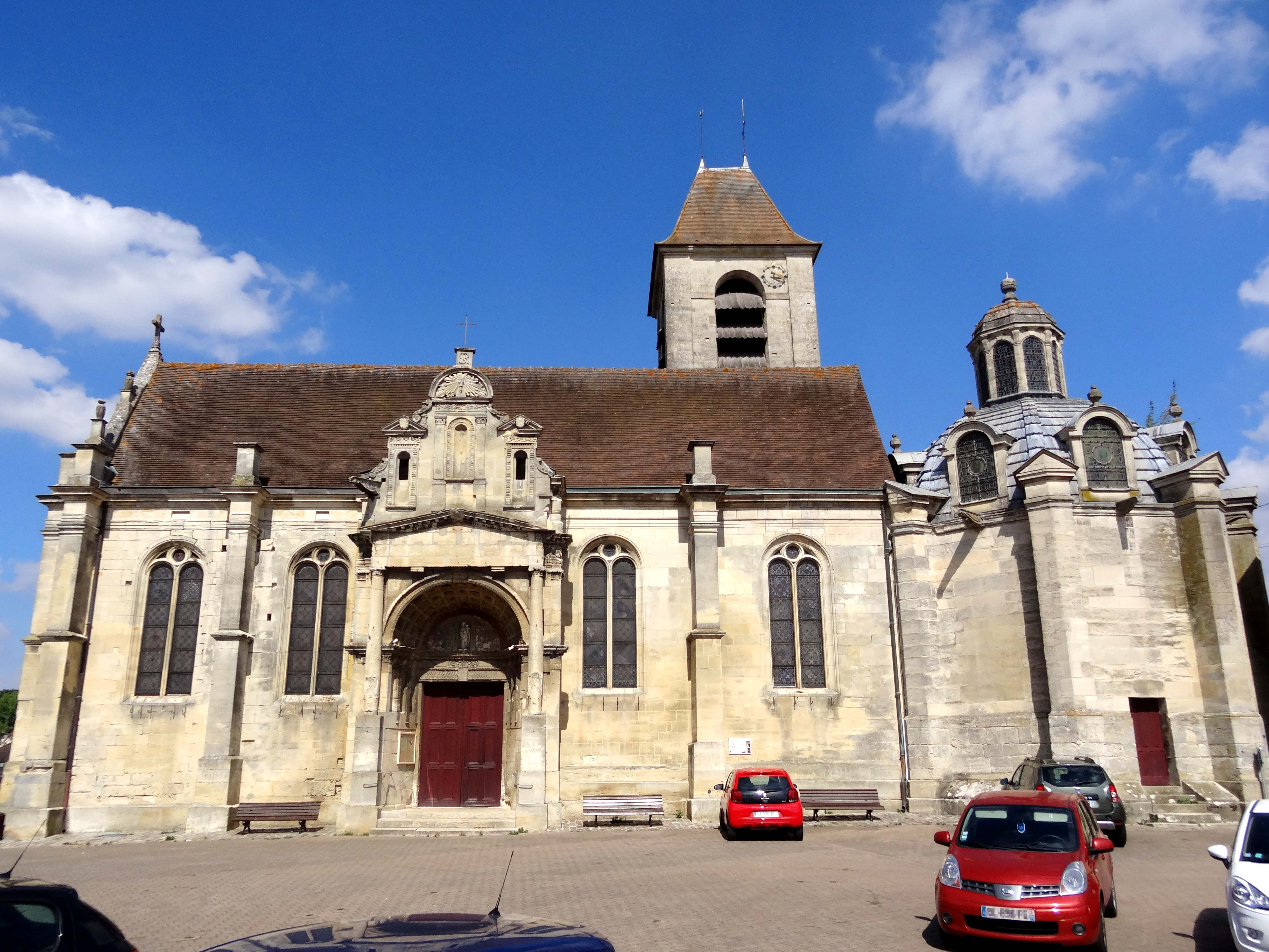 Église Saint-Rémi de Marines - voir titre.